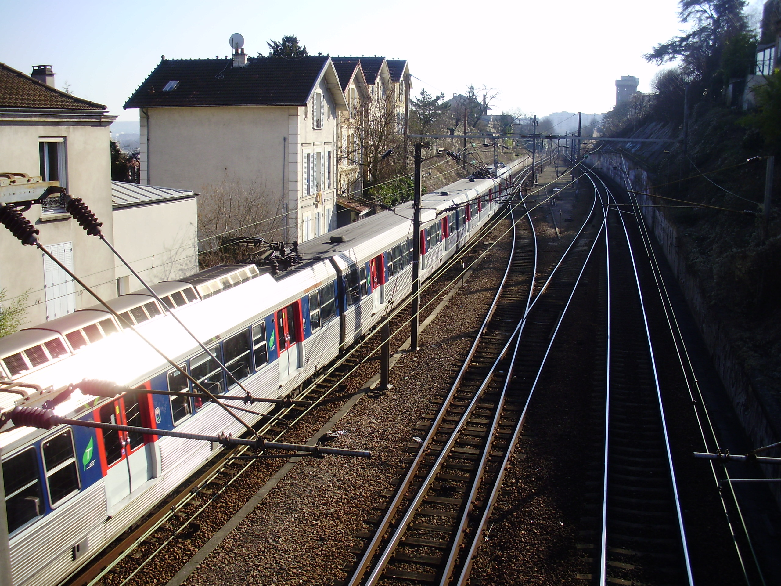 Gare de Suresnes-Mont-Valérien, à Suresnes, Hauts-de-Seine, France (Vue en direction du sud, depuis la passerelle de la rue du Calvaire, au sud de la gare)